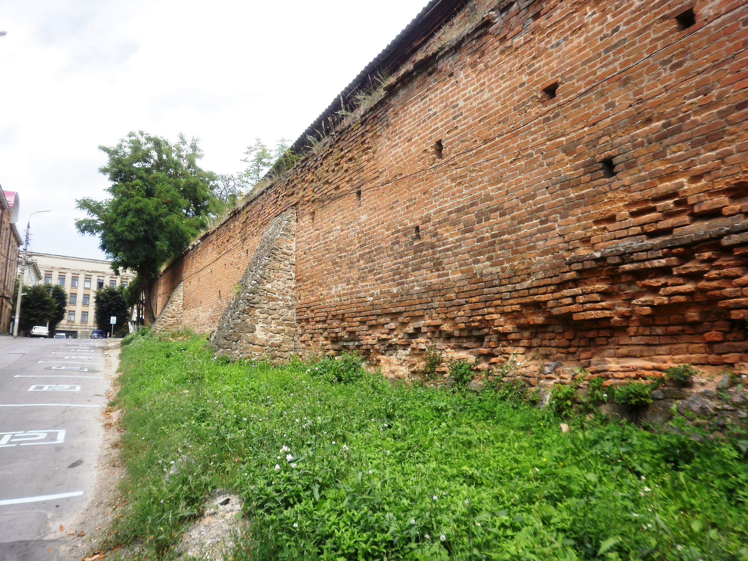 Домініканський монастир - Башта та мур., Вінниця, вул. П.Осипенко, 1